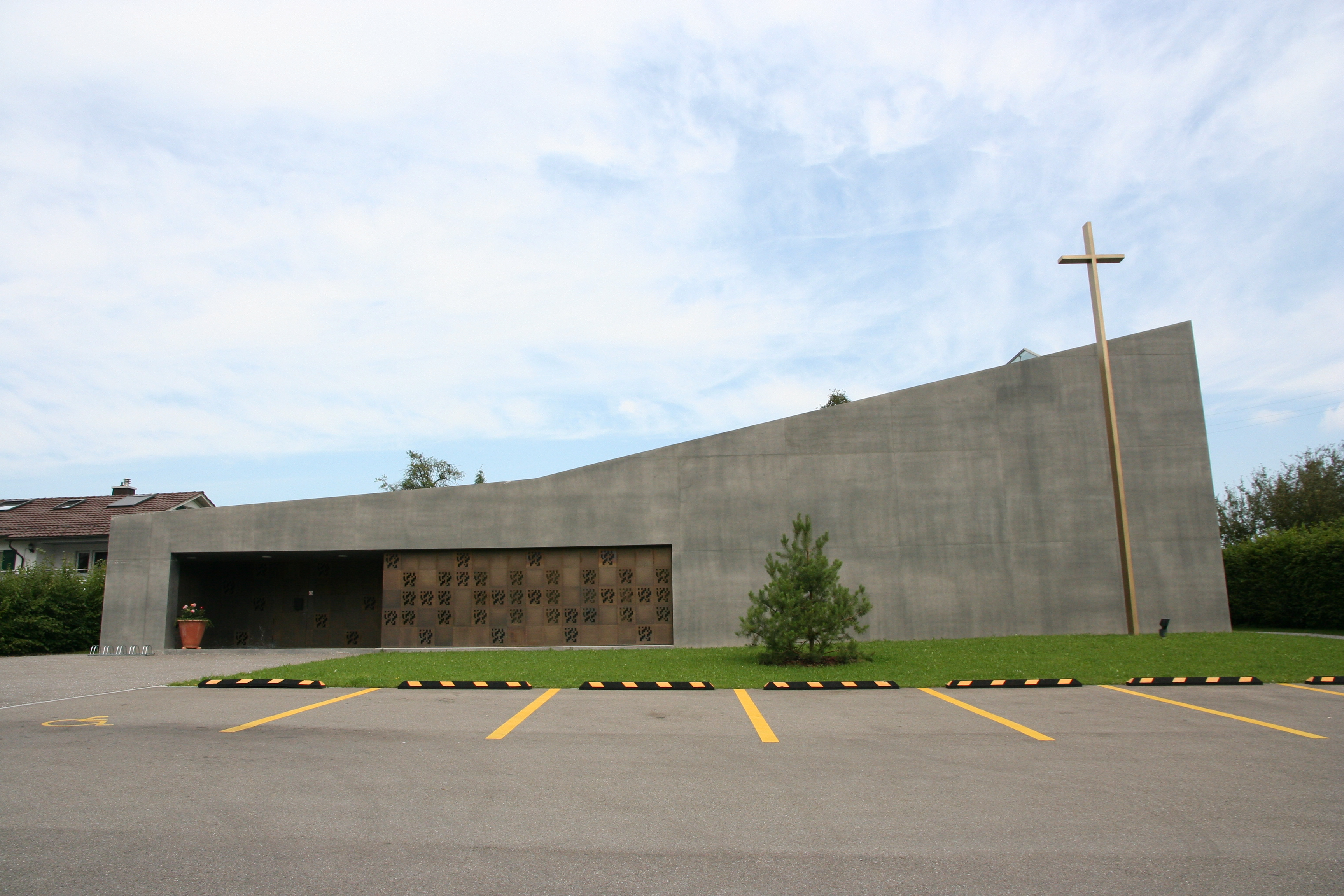 Römisch-katholische Kirche St. Marien Richterswil-Samstagern, Aussenansicht